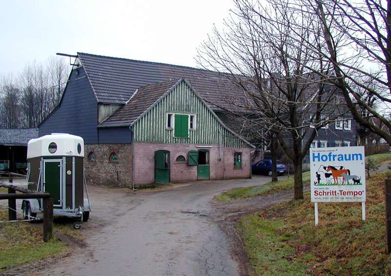 Hückeswagen-Wüste: Ansicht in Wüste